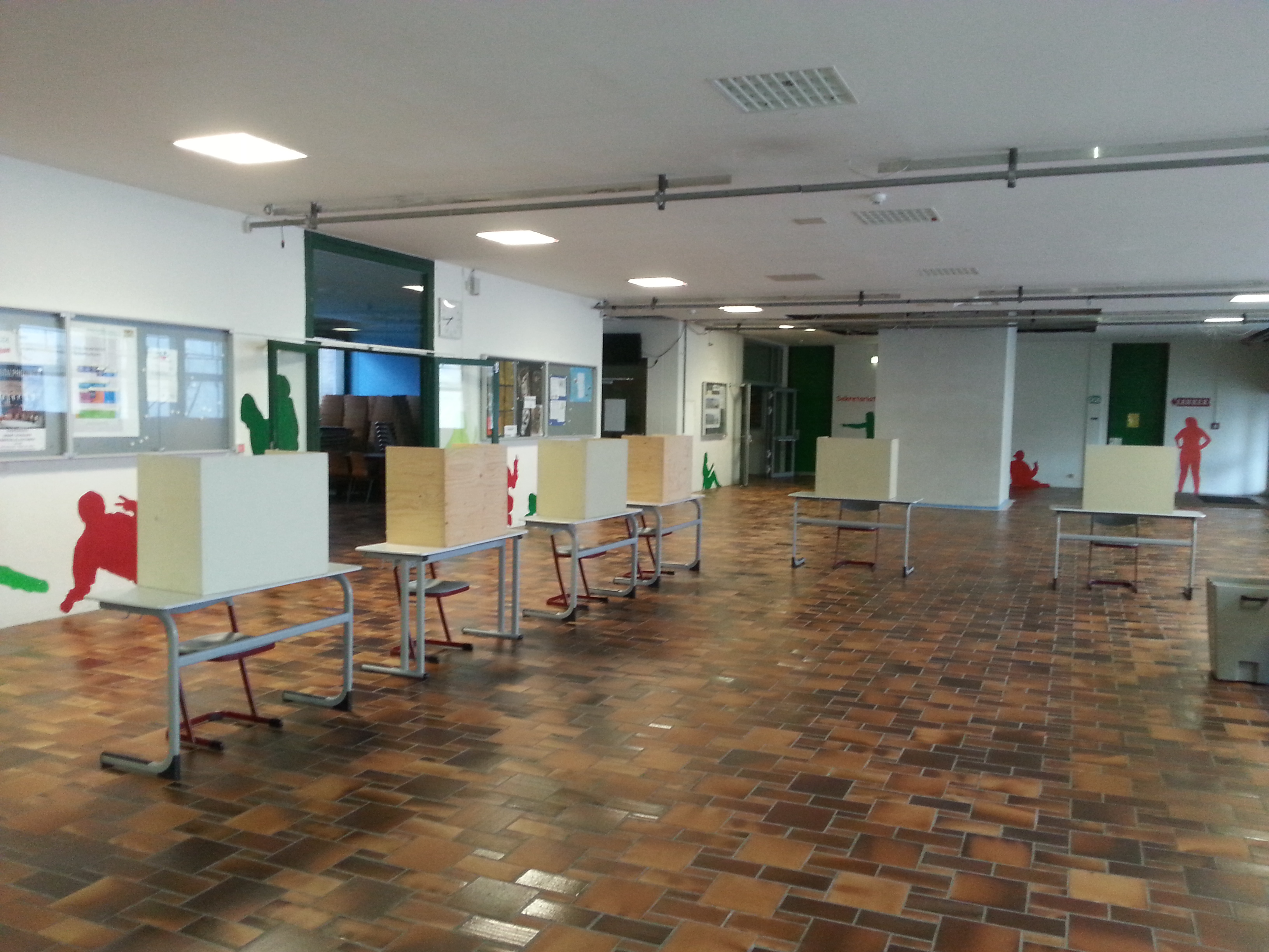 Wahllokal Bundestagswahl 2013